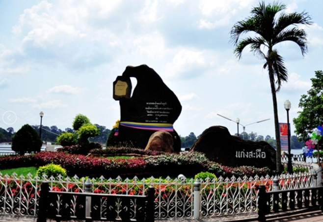 หินพระปรมาภิไธย พระบาทสมเด็จพระปรมินทรมหาภูมิพลอดุลยเดช และ สมเด็จพระนางเจ้าสิริกิติ์ พระบรมราชินีนาถ ในรัชกาลที่ 9 ณ แก่งสะพือ